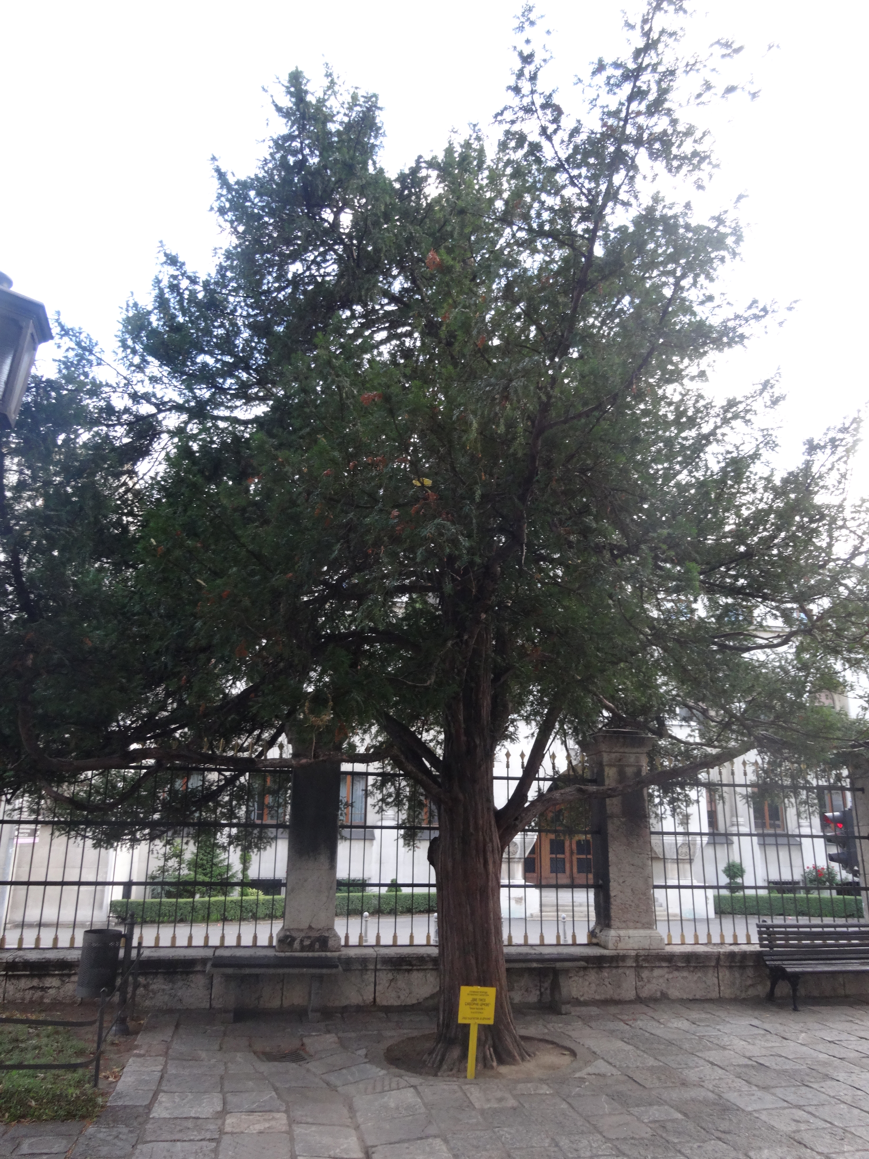 Споменик природе Две тисе Саборне цркве Ово је фотографија заштићеног природног добра у Србији под шифром: СП012 This is a a photo of a natural area in Serbia with ID: СП012